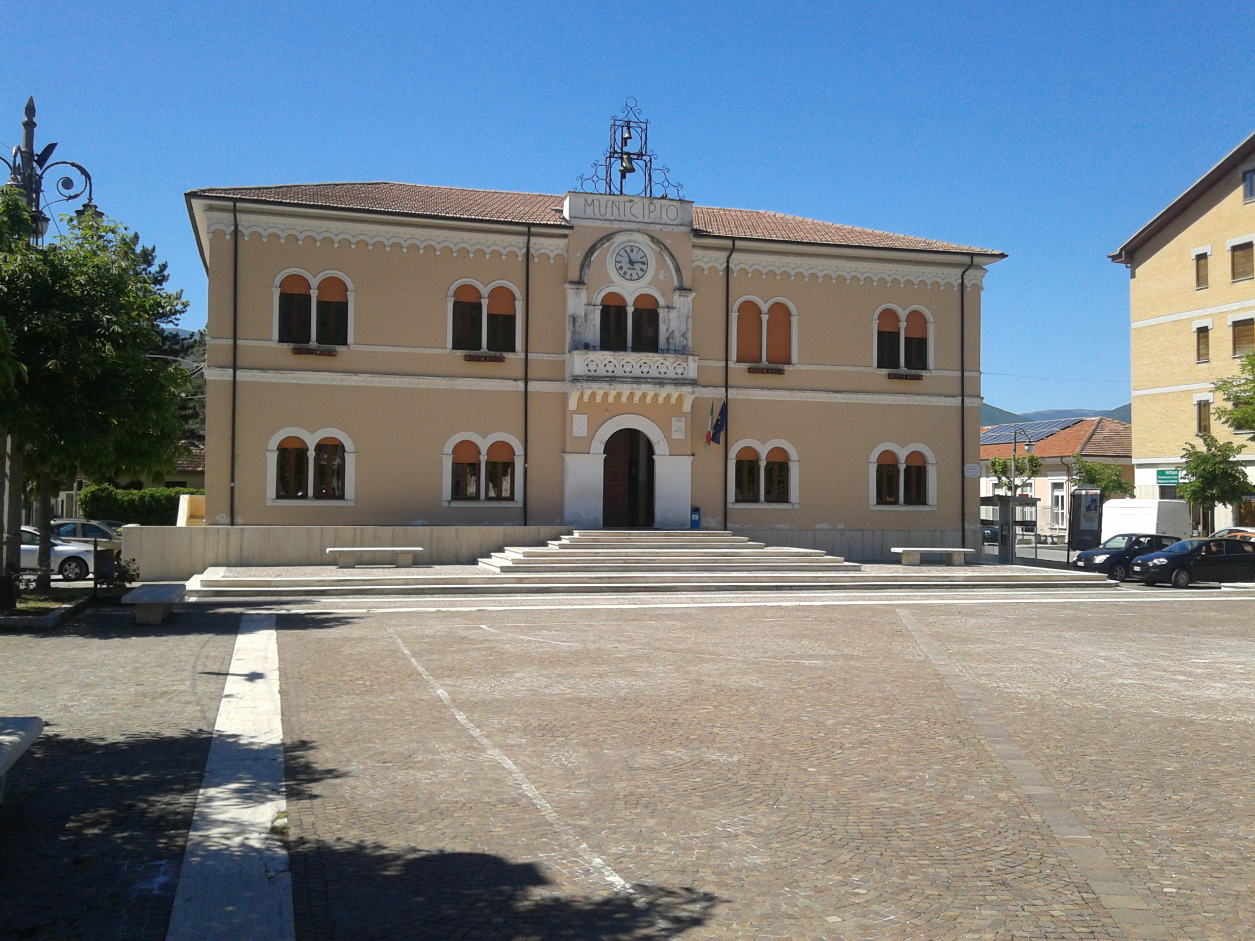 Municipio di Gioia dei Marsi